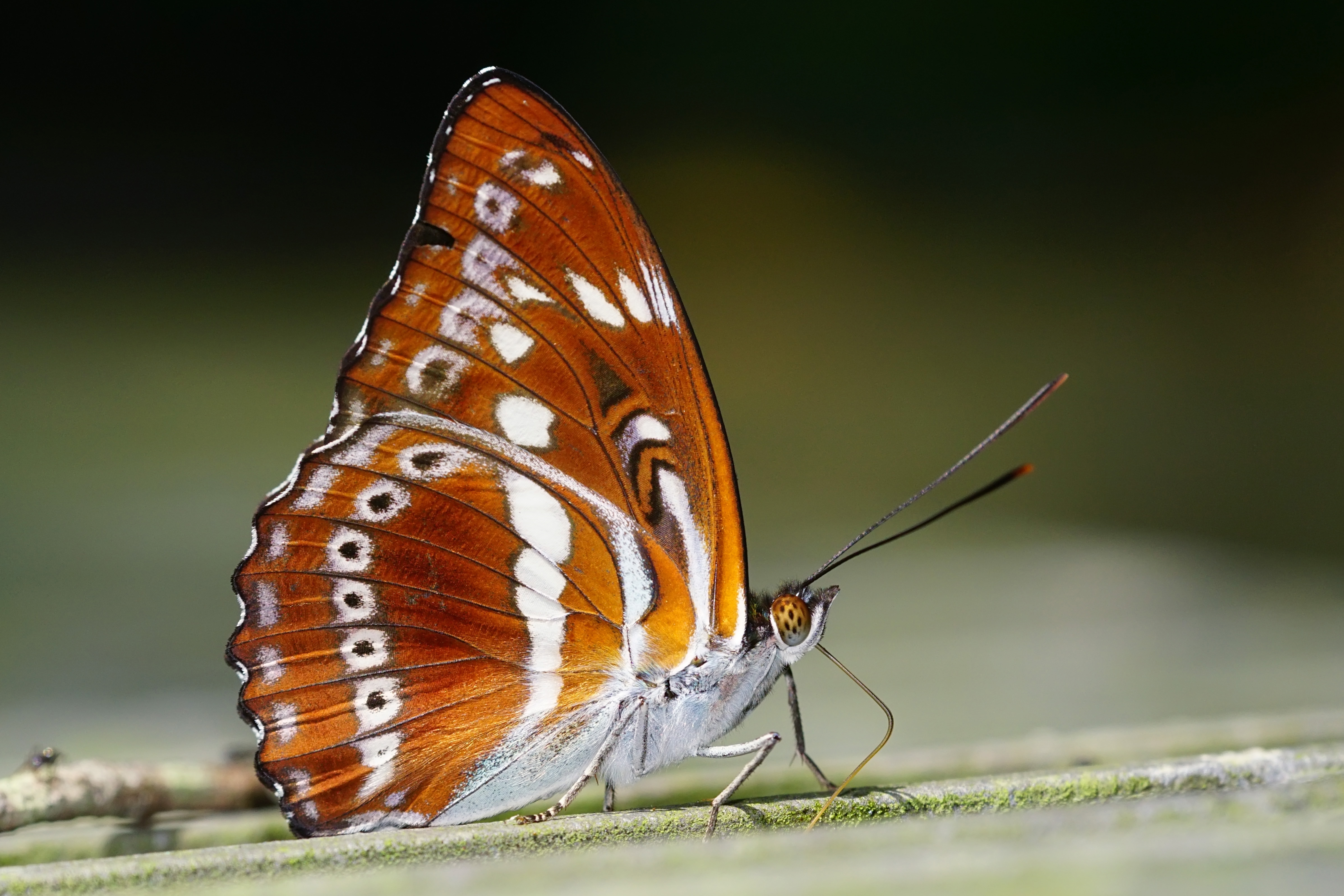 白圈帶蛺蝶 Athyma asura baelia